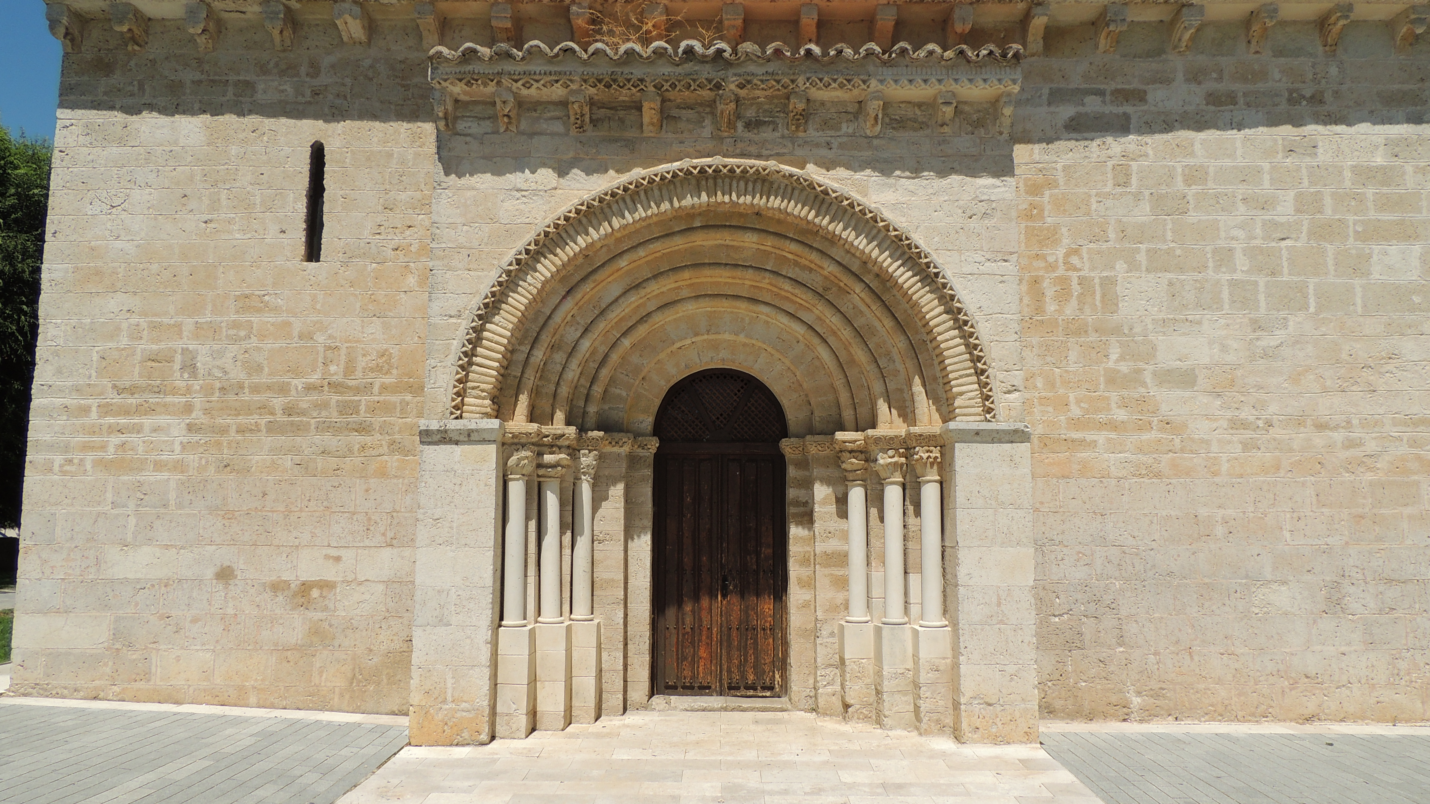 Portada